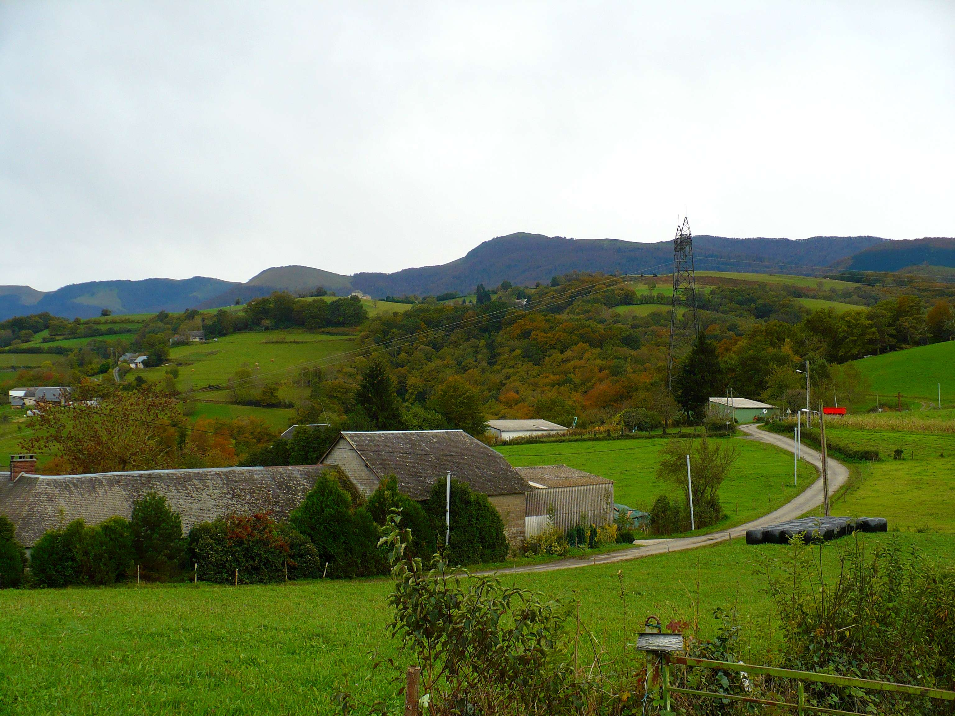 Paysage des Baronnies, commune de Bettes, France